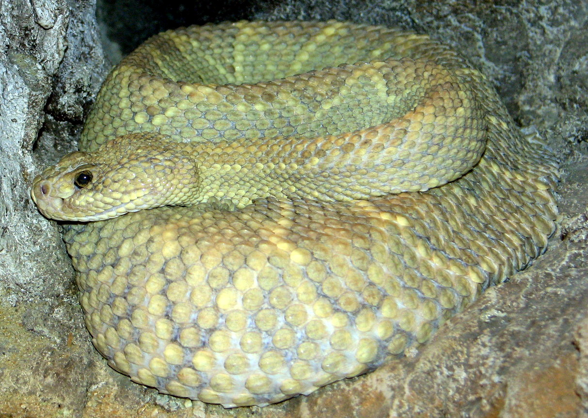 Aruba ratelslang, Crotalus unicolor, Diergaarde Blijdorp, Rotterdam, december 2007.